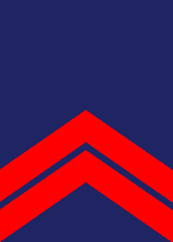 Insegna da Caporale Maggiore dell'esercito napoleonico